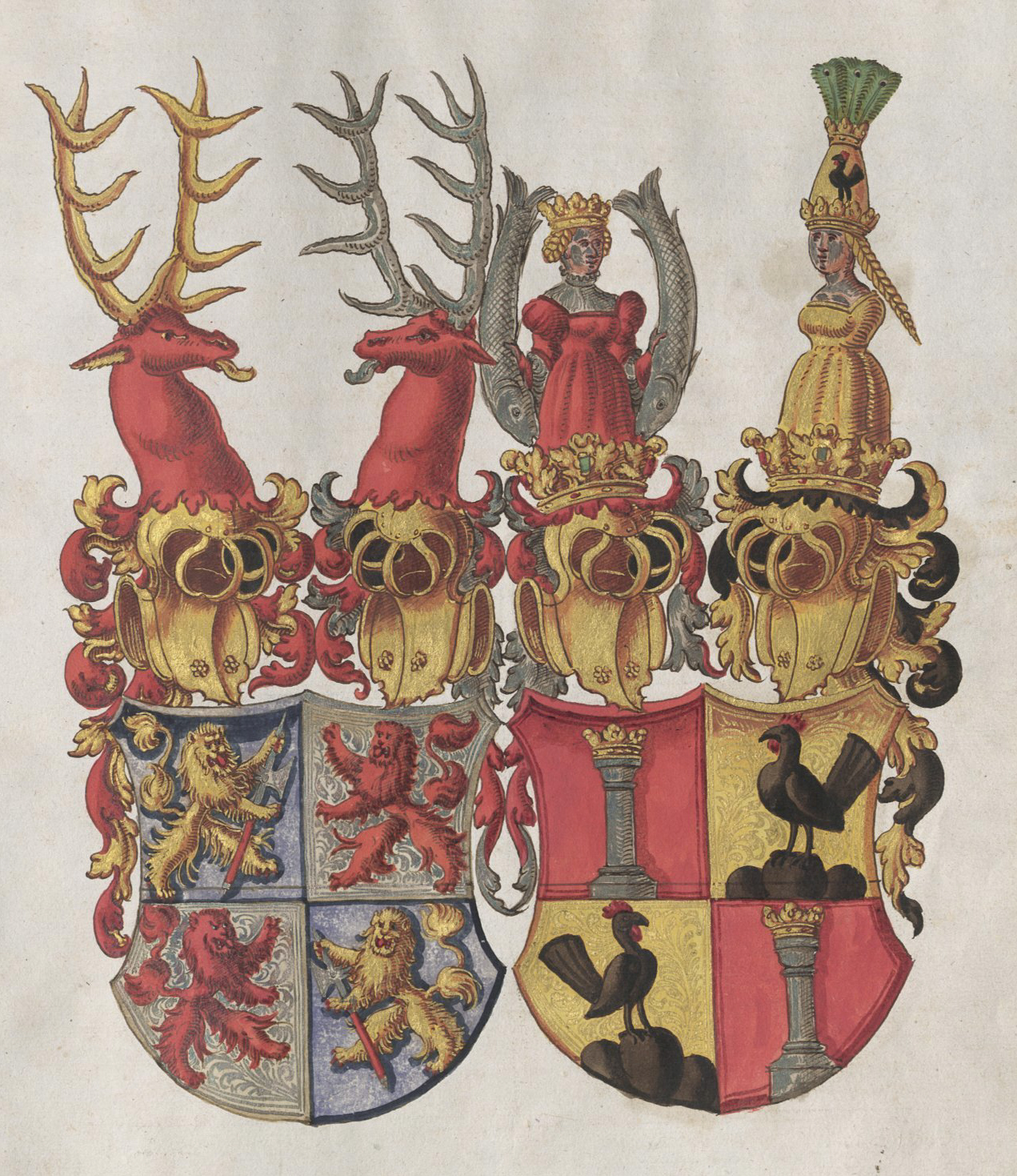 Wappen aus der Zimmerischen Chronik, Handschrift B, Württembergische Landesbibliothek Stuttgart, Cod. Don. 580a, S. 516b, Allianzwappen Zimmern / Henneberg